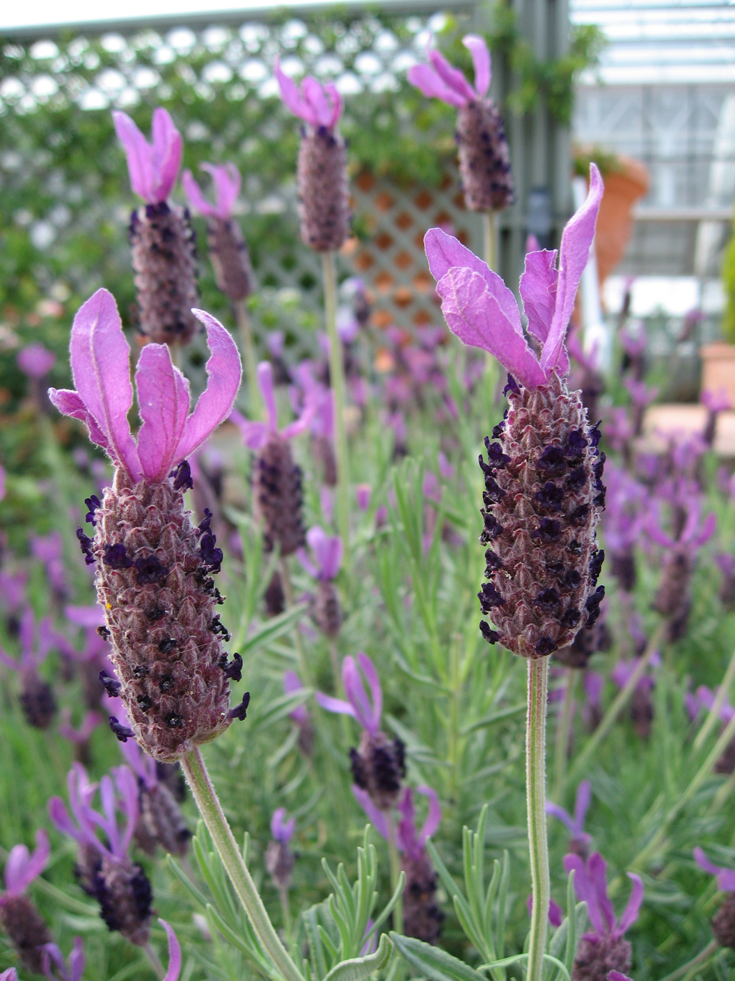 Lavandula stoechas Isedera Matsusaka Mie, Japan